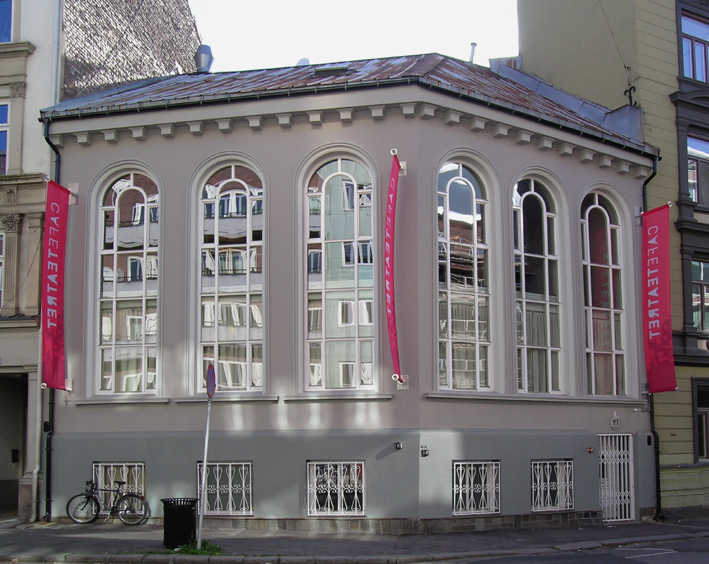 Caféteatret, Hollendergata, Oslo. Nå Nordic Black Theatre. Opprinnelig bygget for Kristiania 2. Methodistmenighet Elim. Arkitekt Rudolf Haeselich.